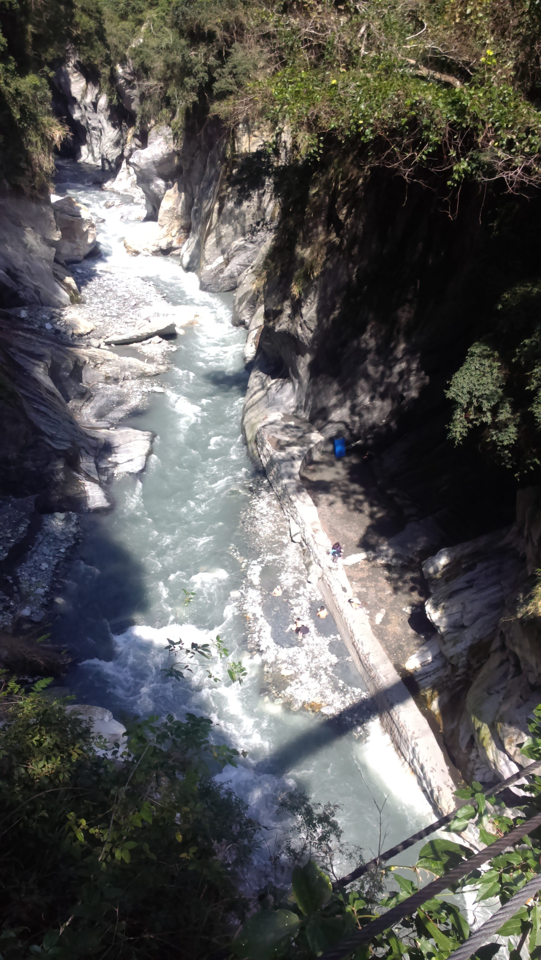 從文山溫泉吊橋拍攝的文山溫泉